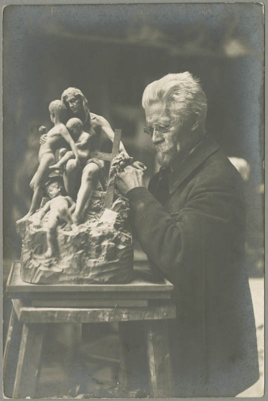 MuuseumikoguFotokoguMuuseumikoguFotokogu sisu kirjeldus Amandus Adamson viimistlemas oma teost "Sõjaviletsused" tekst objektil Prof. A. Adamson oma ateljees Baltiskis. Asukoht objektil: ülal keskel